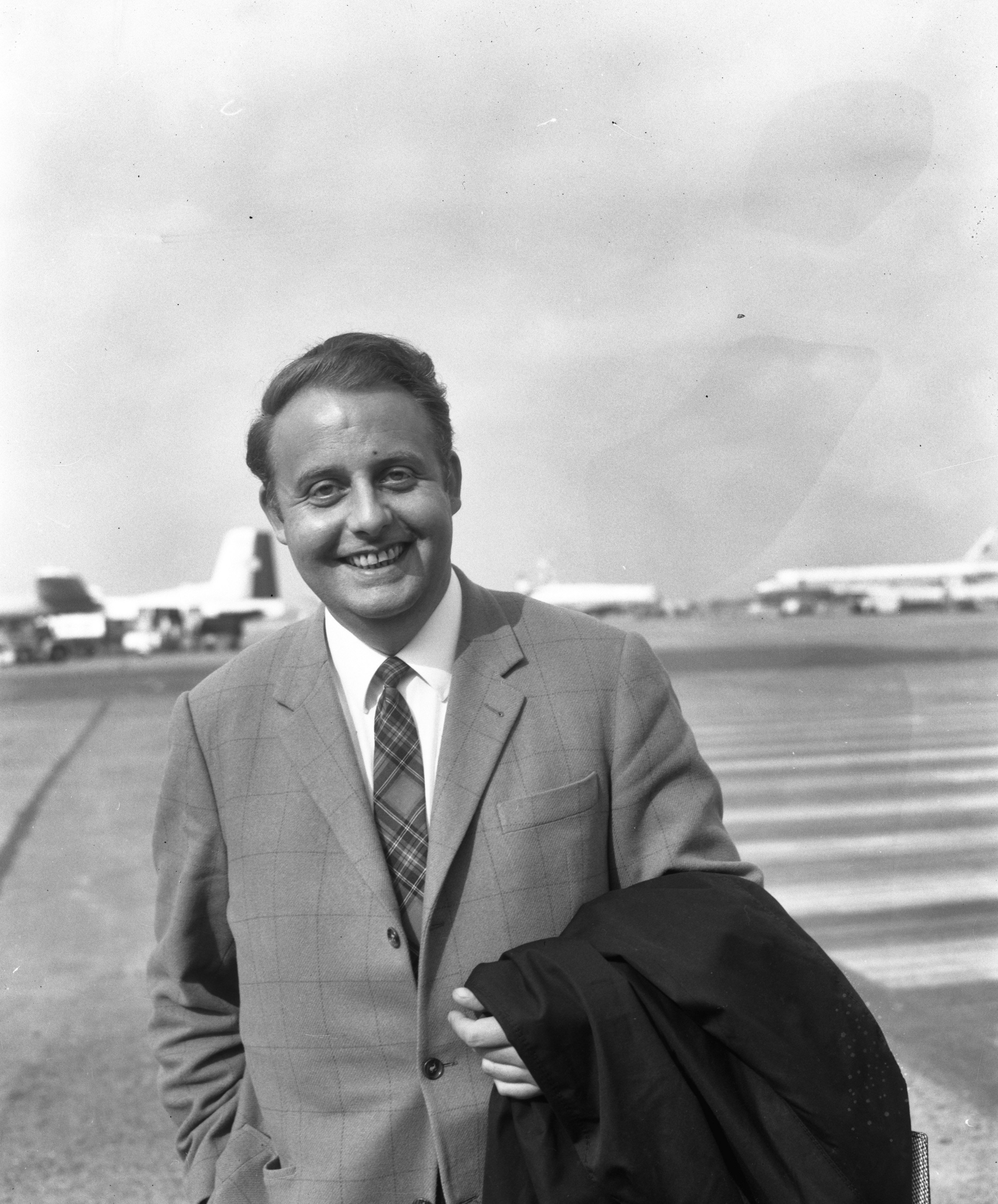 Collectie / Archief : Fotocollectie Anefo Reportage / Serie : [ onbekend ] Beschrijving : Aankomst Duitse zanger Ronny op Schiphol Datum : 3 oktober 1965 Locatie : Noord-Holland, Schiphol Trefwoorden : aankomsten, zangers Fotograaf : Bilsen, Joop van / Anefo Auteursrechthebbende : Nationaal Archief Materiaalsoort : Negatief (zwart/wit) Nummer archiefinventaris : bekijk toegang 2.24.01.04 Bestanddeelnummer : 918-2628